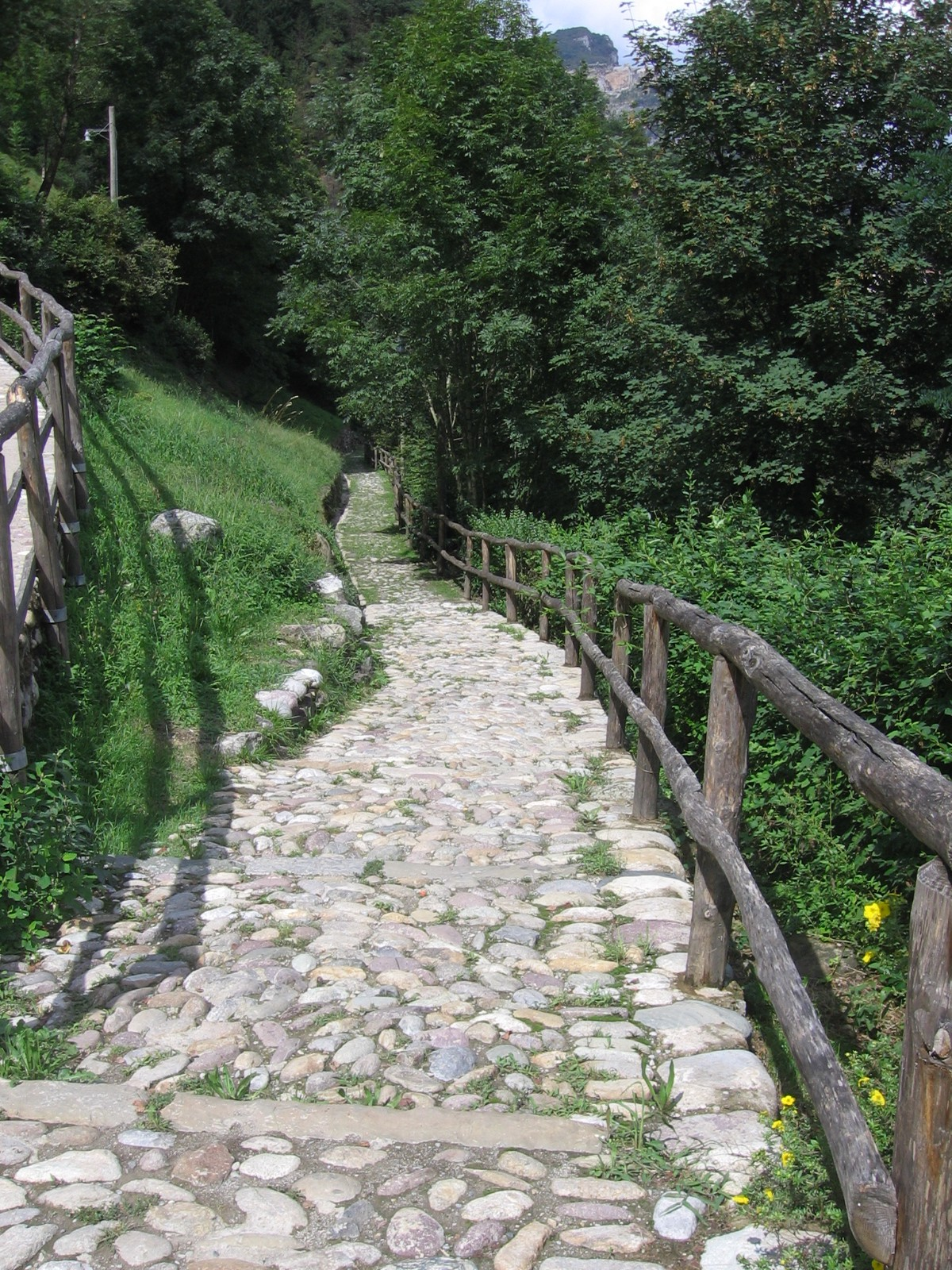 Cornello dei Tasso, Camerata Cornello, Bergamo, Italy